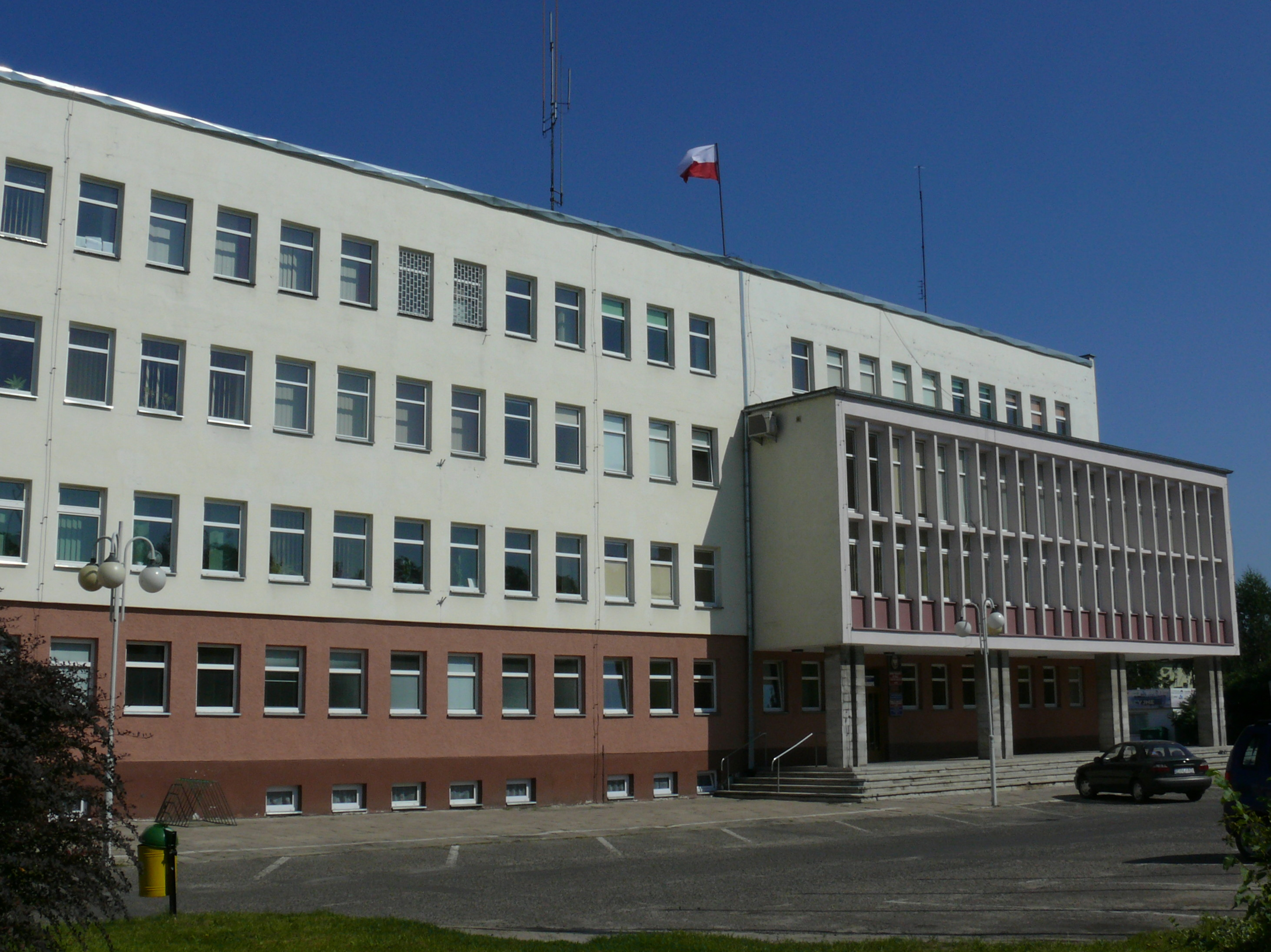 Starostwo Powiatowe w Kole